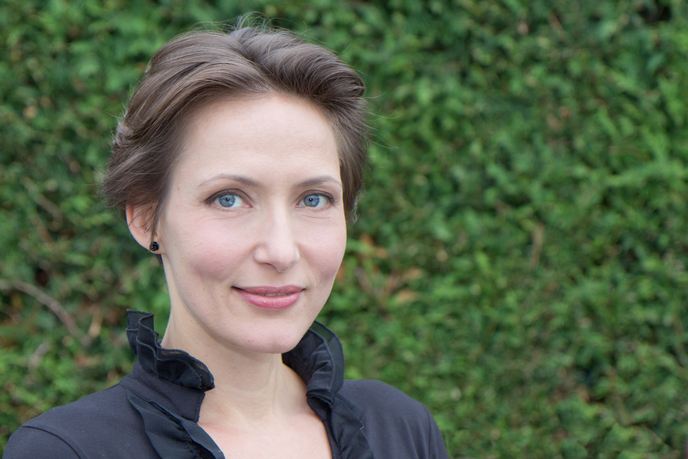 Ina Rudolph (* 22. April 1969 in Brandenburg an der Havel), deutsche Schauspielerin.